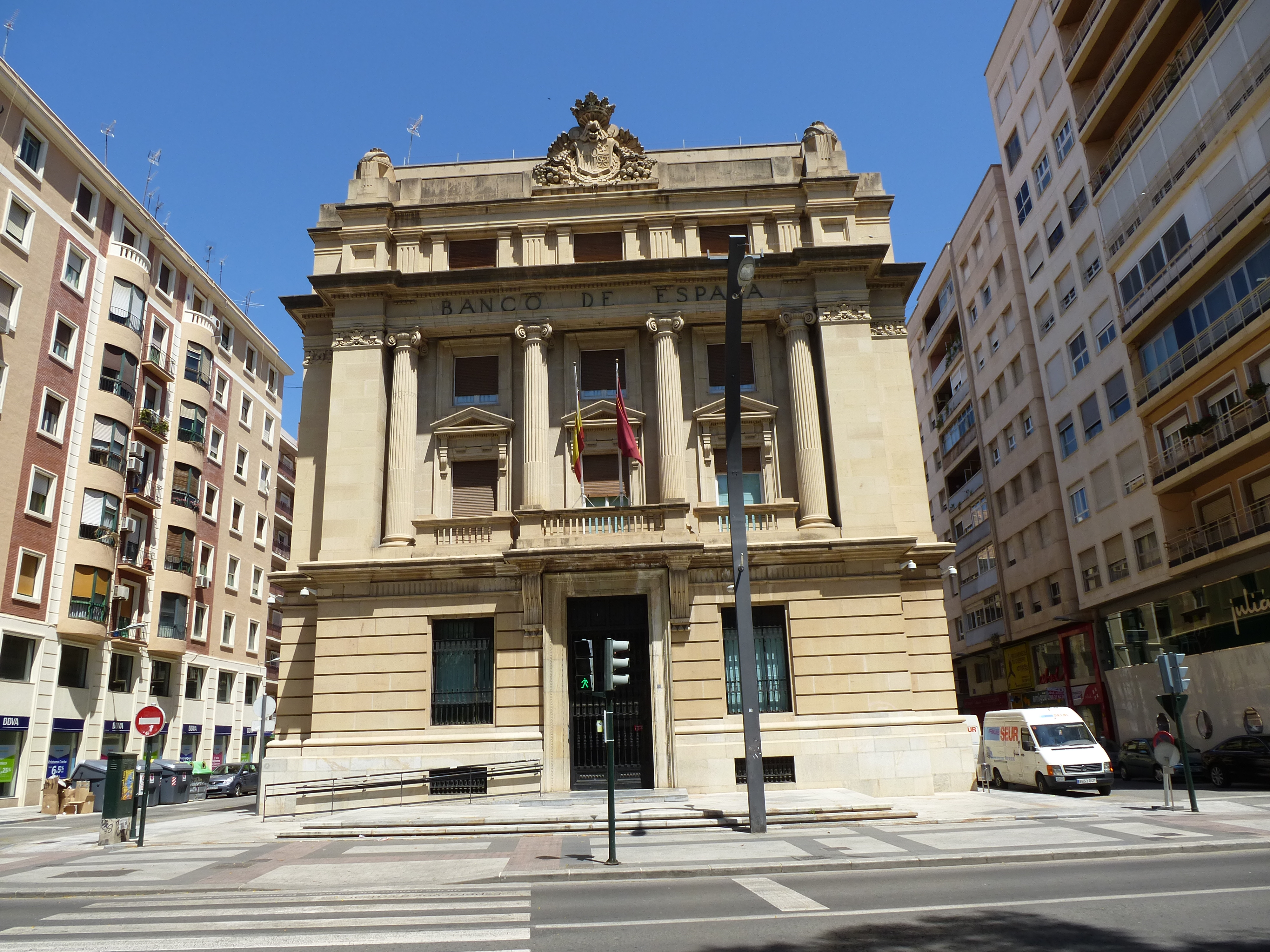 banco de espana